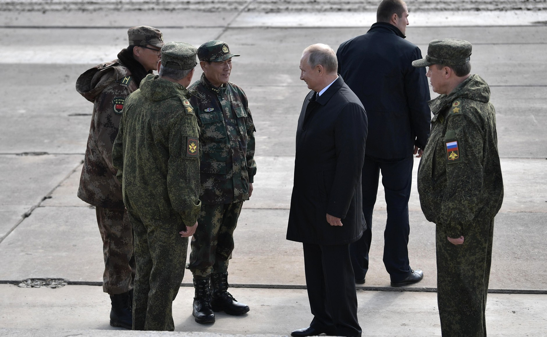 С Министром обороны КНР Вэй Фэнхэ (в центре), Министром обороны России Сергеем Шойгу, начальником Генерального штаба Вооружённых Сил – первым заместителем Министра обороны России Валерием Герасимовым (справа) по окончании военных манёвров «Восток-2018».